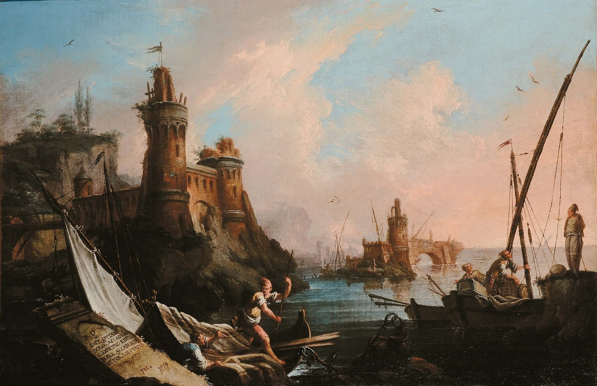 Porto con figure, olio su tela, 73 x 112 cn., firmato, coll. privata